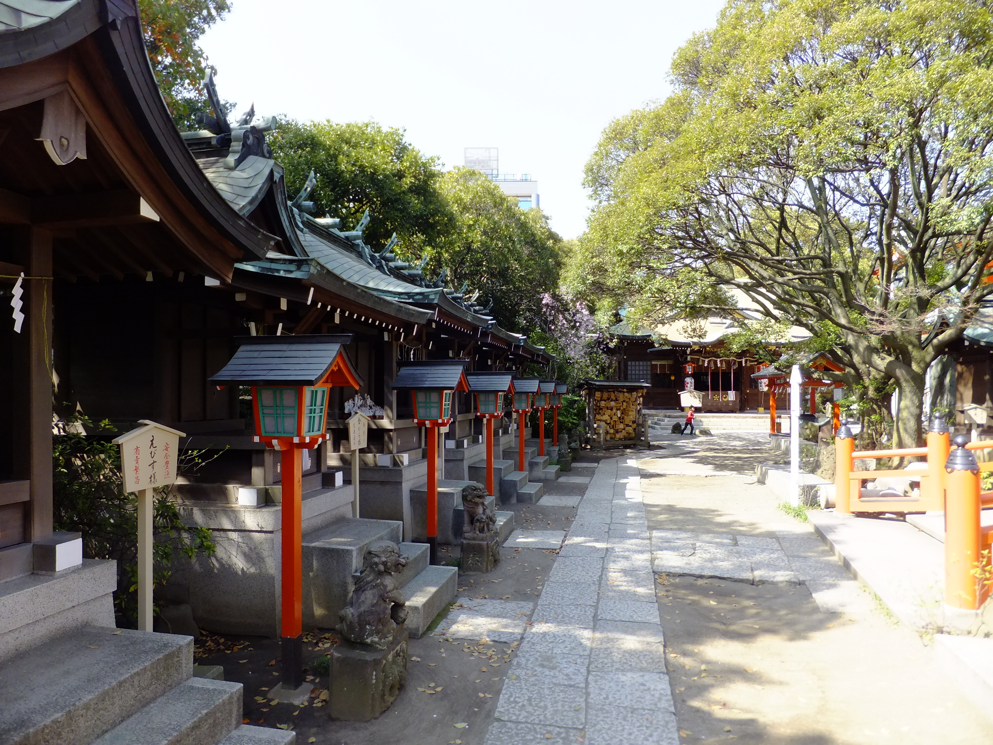 千葉神社、境内末社